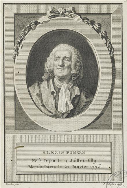 Alexis Piron, 18x12 cm, Versailles, châteaux